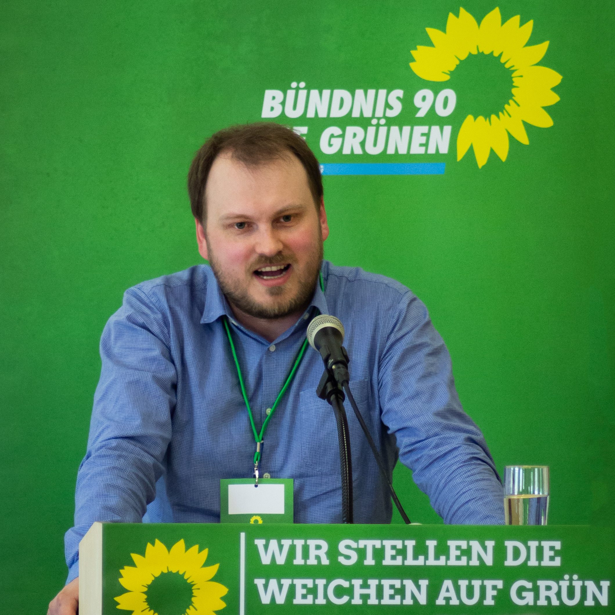 Clemens Rostock auf dem Landesparteirat in Eberswalde 2018